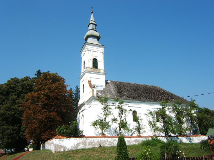 Kálmáncsa református műemlék temploma